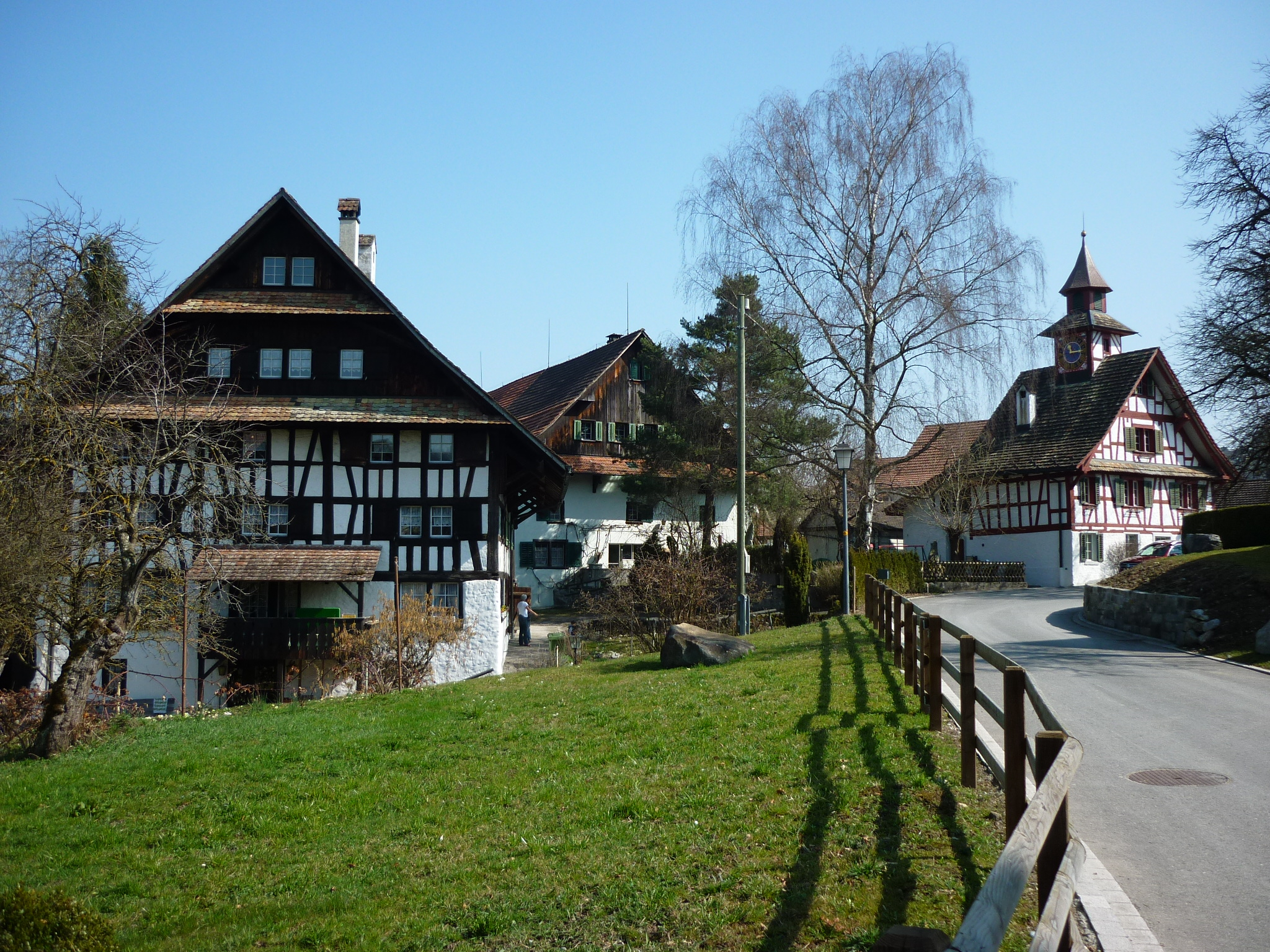 Historische Häuser im Ortskern von Aesch ZH, Schweiz